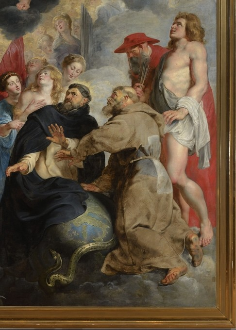 Peinture